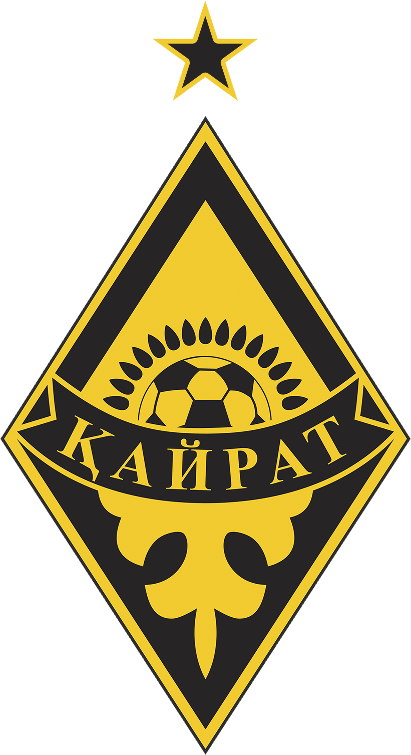 Логотип Футбольного Клуба "Кайрат" из города Алматы